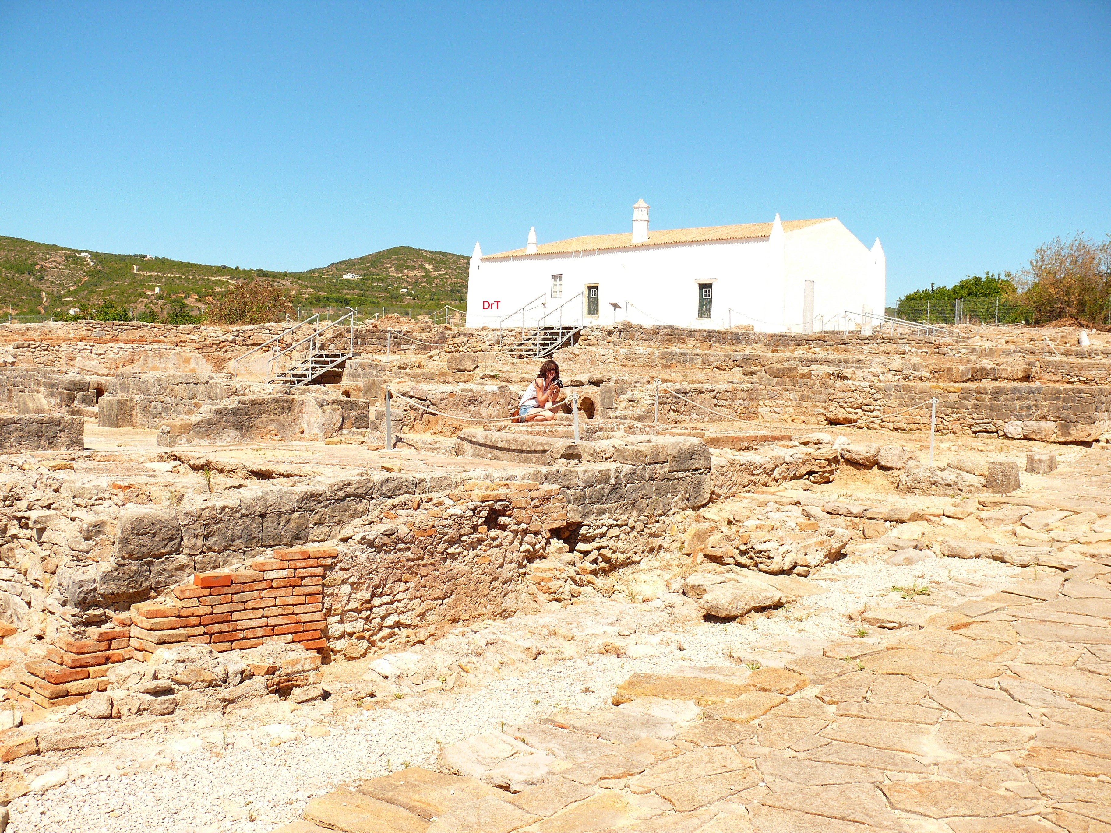 Milreu Villa Blick auf Wohnanlage und Gutshof Südwest-Nordost